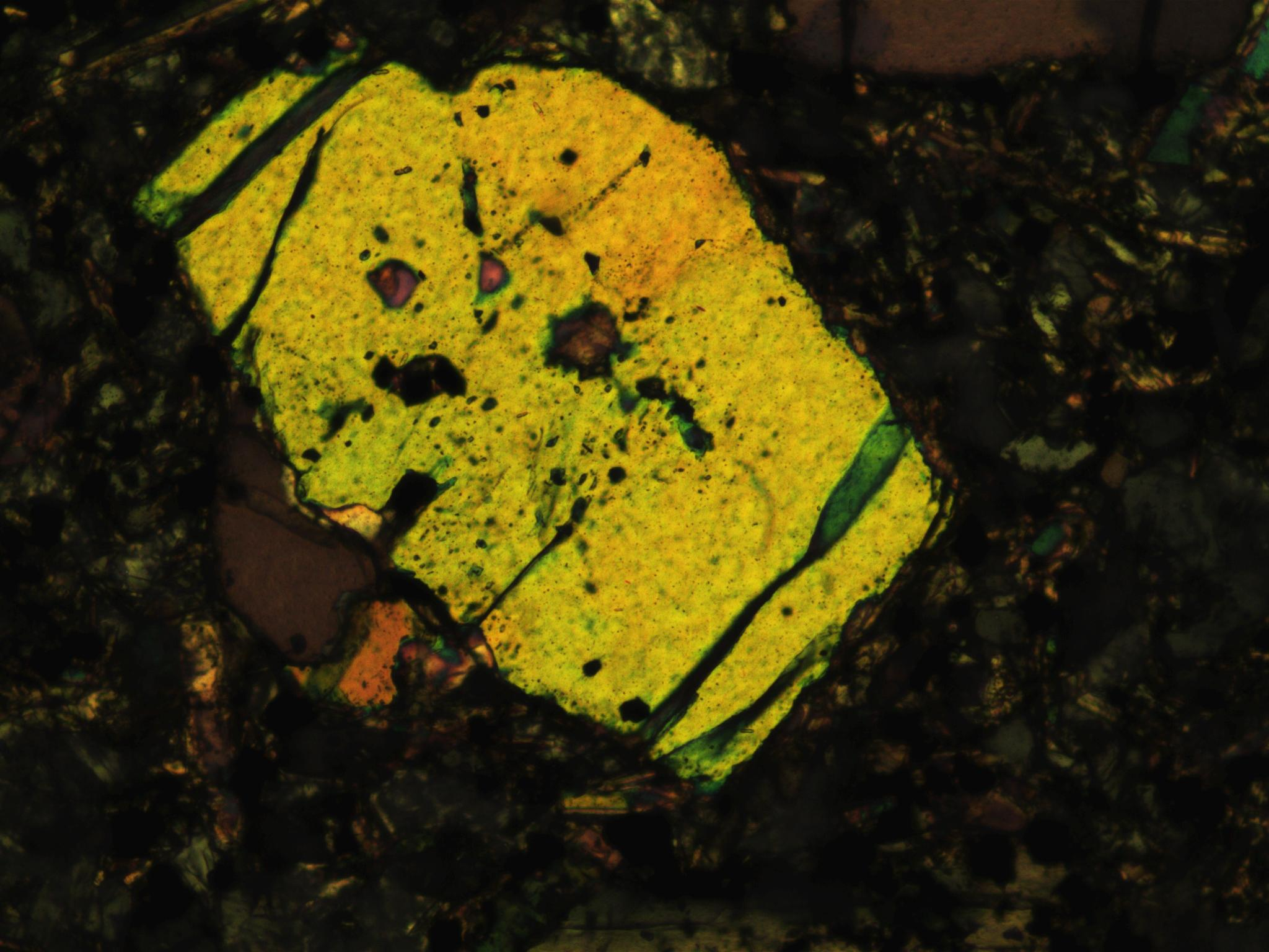 Fotografia d'un cristall d'olivina mitjançant u microscopi petrogràfic